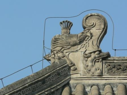 鸱尾 吞脊兽 拍摄